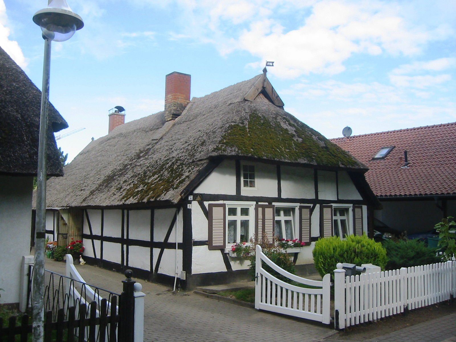 Denkmalgeschütztes Wohnhaus in der Bergstraße 1in Wusterhusen, einer Gemeinde in Vorpommern-Greifswald (Mecklenburg-Vorpommern)